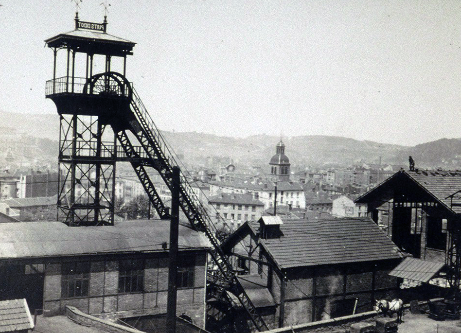 Puits Didot à Villeboeuf ( Saint-Etienne, 42, FR )